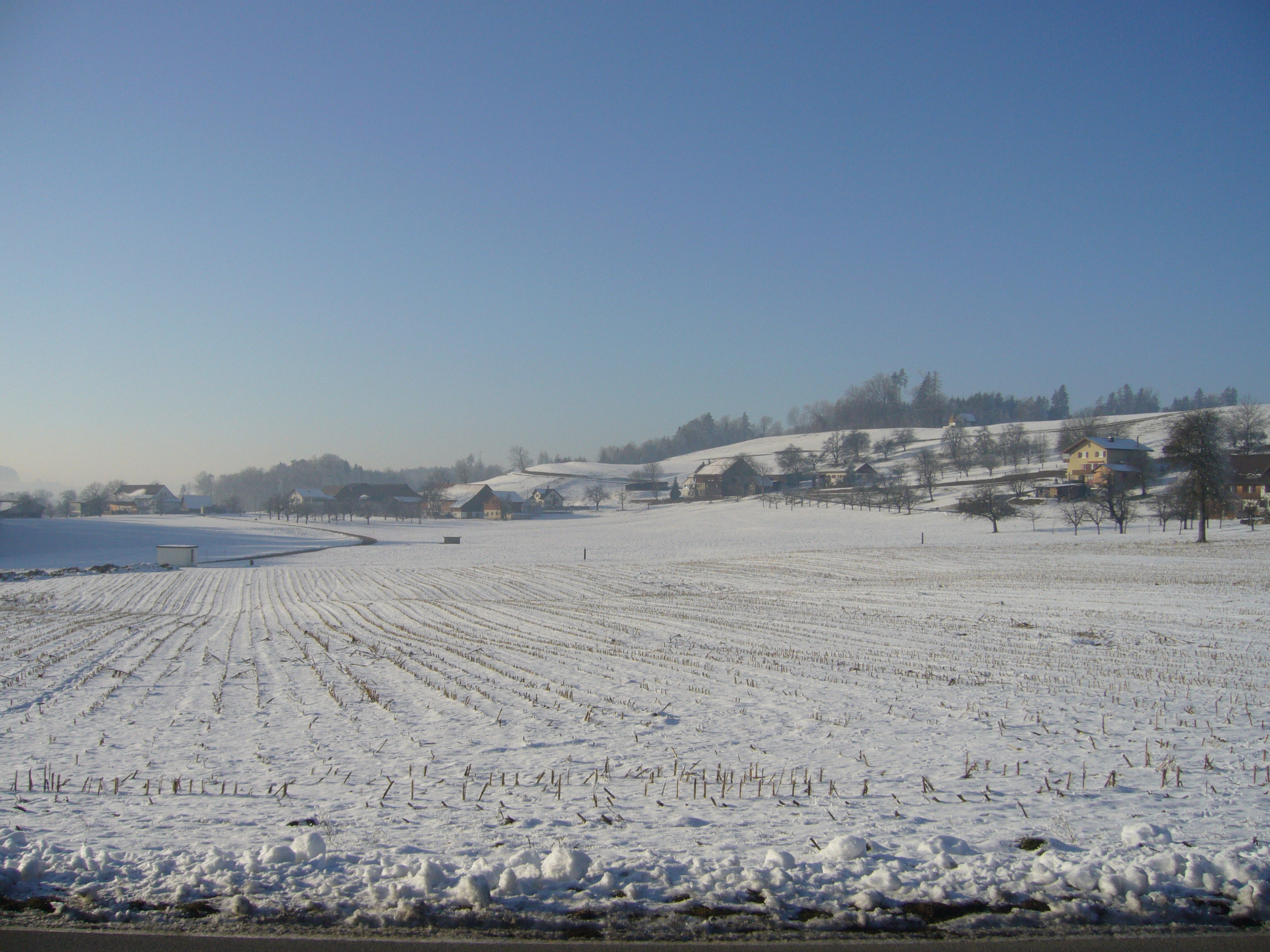 Blick von Osten Richtung Hinterhalingen.